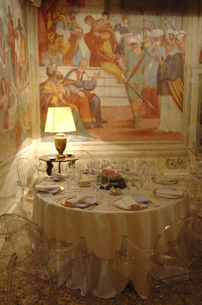 Alcuni affreschi del Gabrieli (circa metà secolo XVII) presso Villa Borromeo Padova